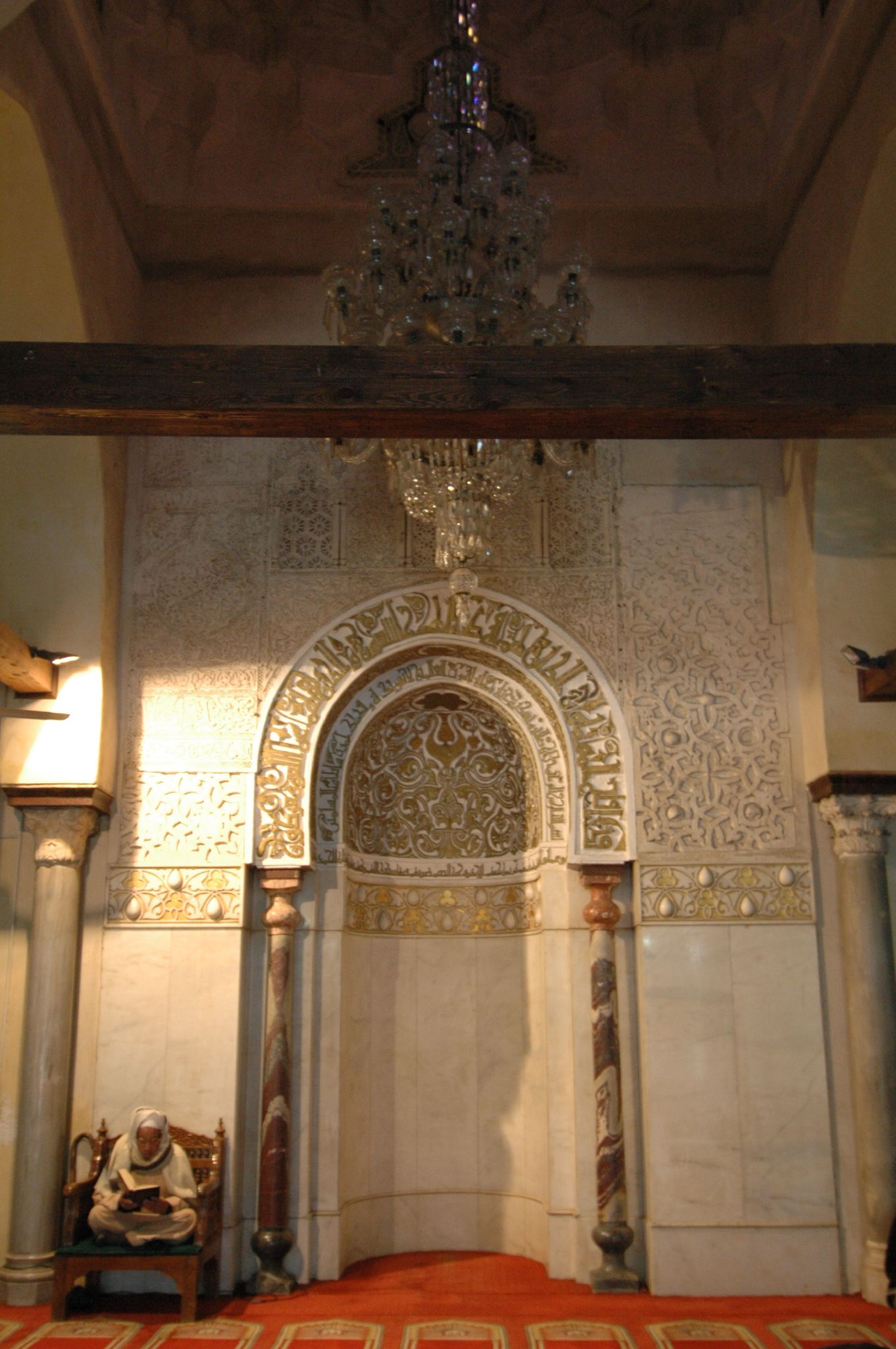 Cairo: moschea di El-Azhar